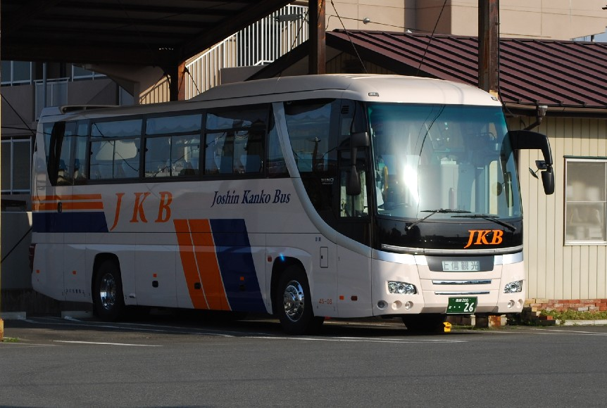 上信観光バス45-06号車。上信観光バス営業所敷地外（公道上）から撮影。上信観光バスの新塗装車両。